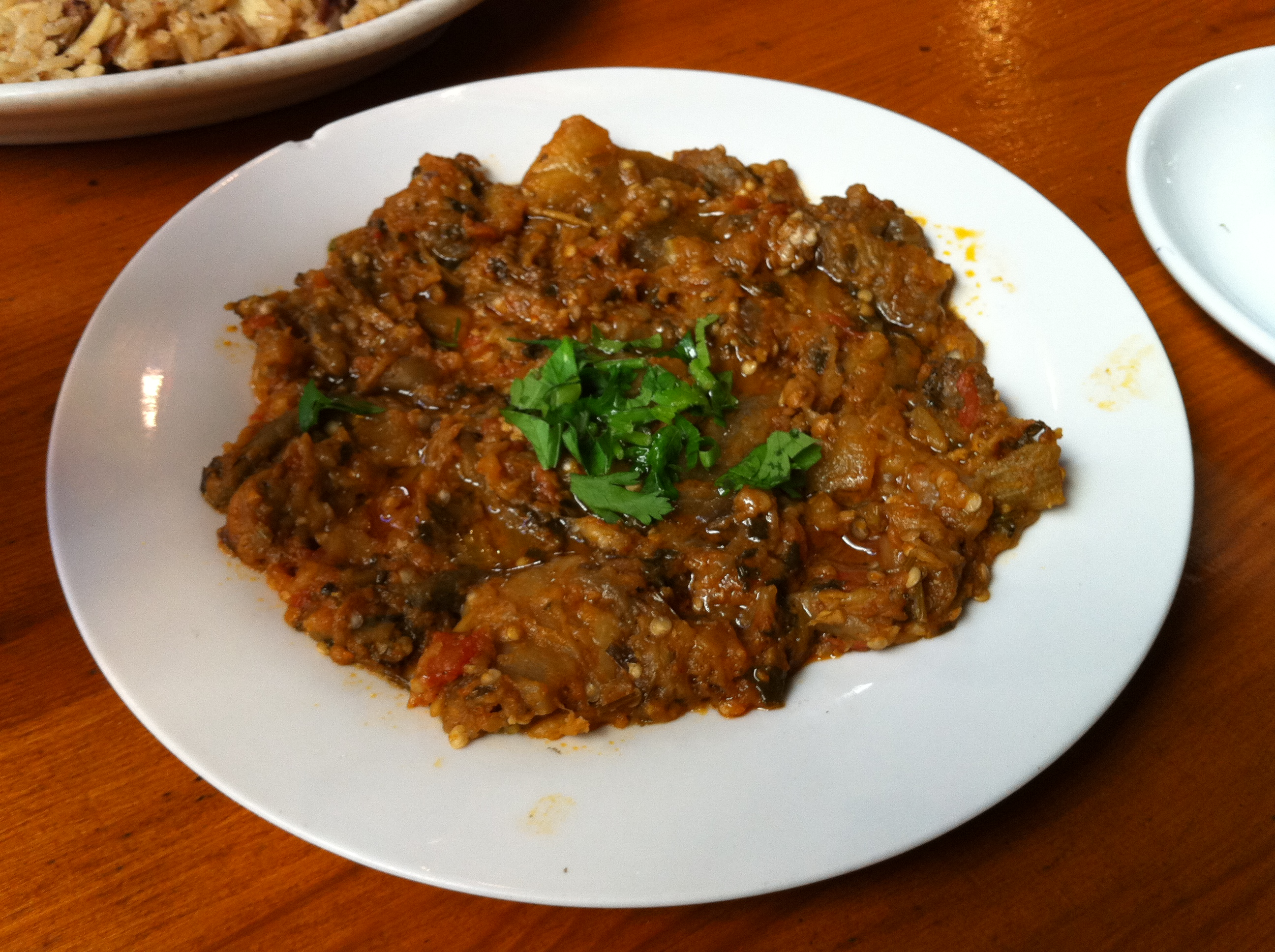 Zaalouk de berenjenas